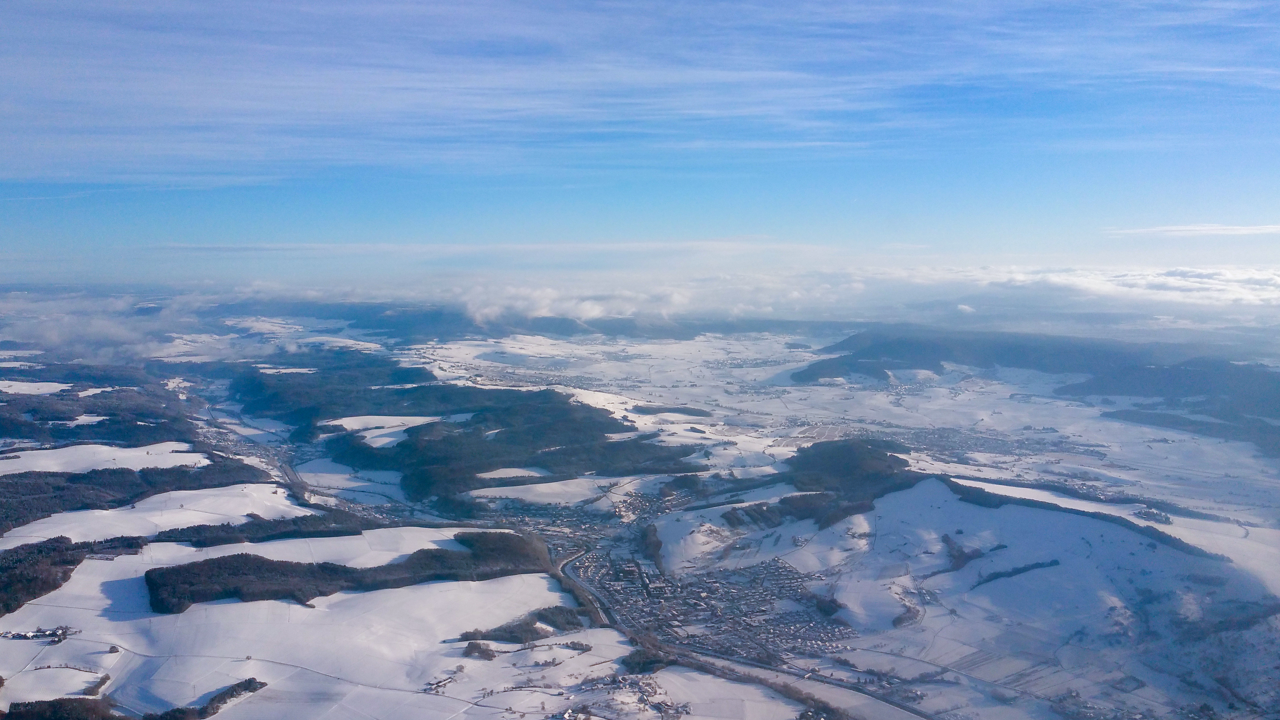 Germany, Baden-Württemberg, approach into ZRH across the Southern part of Black Forest. ACHTUNG: Entgegen der Bildbenennung handelt es sich hier um Wutöschingen und im Hintergrund die Klettgau-Ebene.